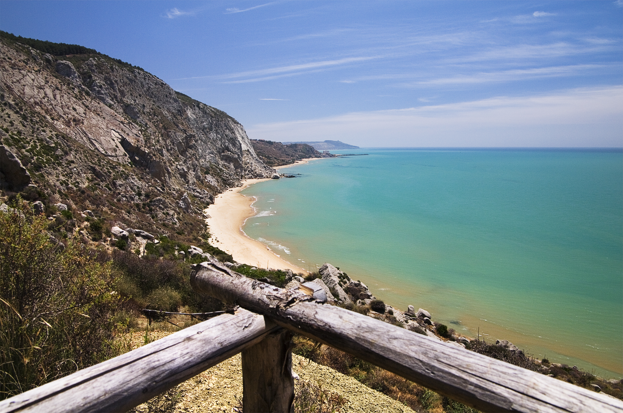 Riserva Naturale Torre Salsa This is a photo of a monument which is part of cultural heritage of Italy. The authorisation for taking photos of this object was provided by the World Wide Fund for Nature Italy.